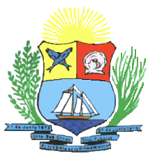 Escudo del Municipio Tubores. Isla de Margarita.Estado Nueva Esparta. Venezuela